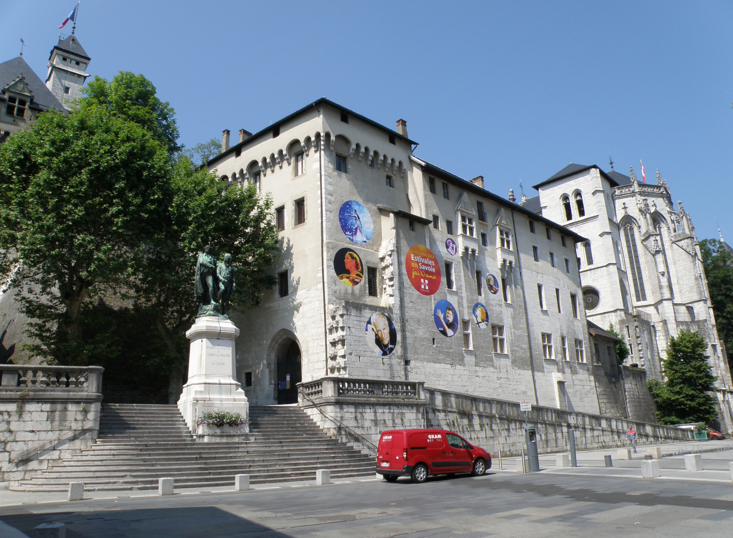 Chambéry, ville et préfecture du département de la Savoie (région Rhône-Alpes, France). Château, vu depuis la place du Château.